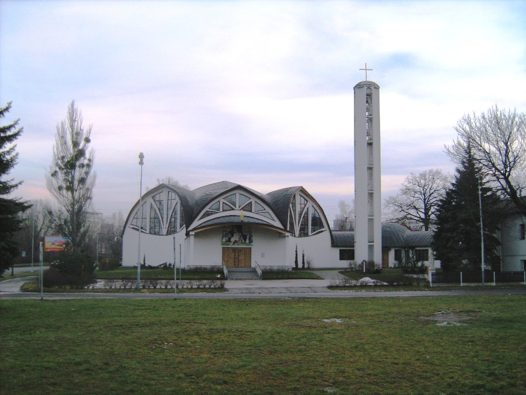 Kostel sv. Cyrila a Metoděje v Pustkovci, Ostrava, Cz/ Church of St. Cyril and Method in Pustkovec, Ostrava, CZ